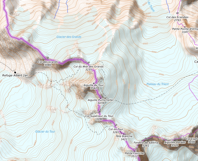 carte réalisée sur umap This map may be incomplete, and may contain errors. Don't rely solely on it for navigation.